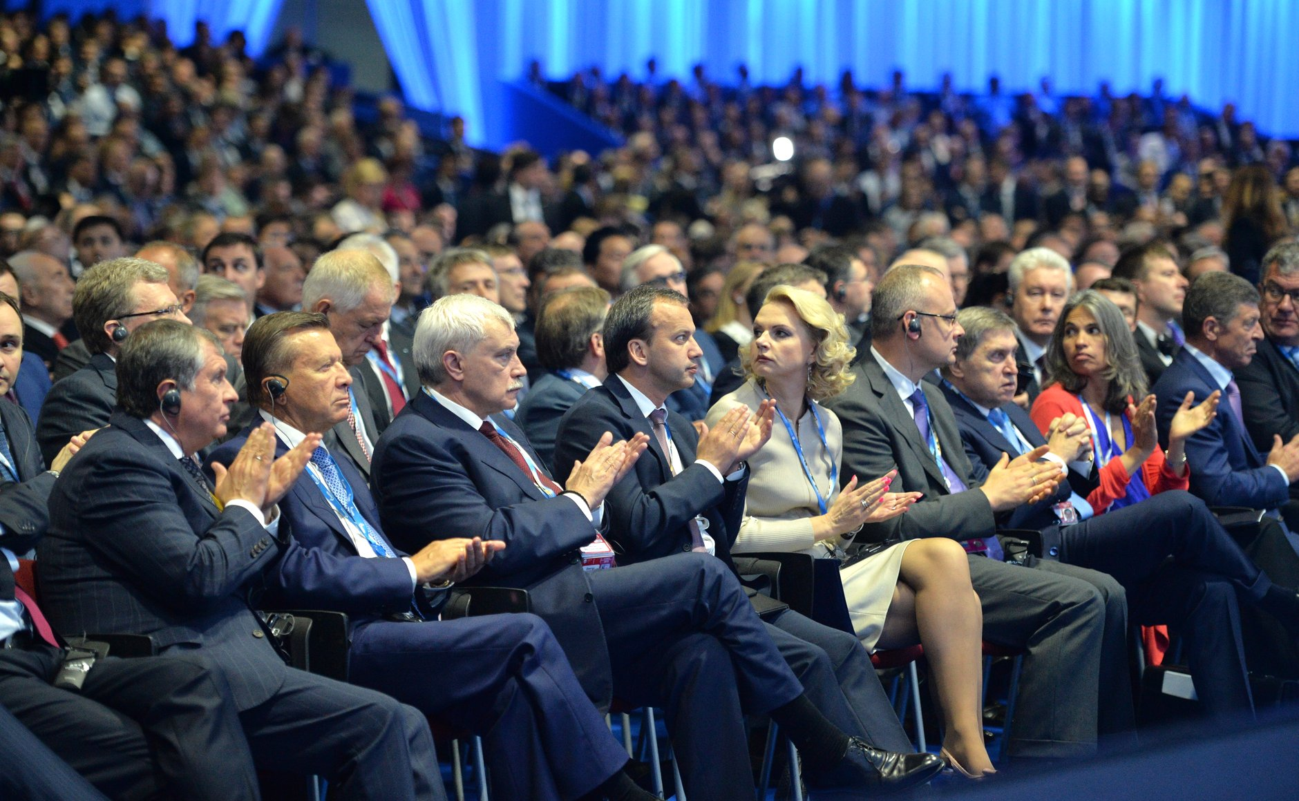 Пленарное заседание XIX Петербургского международного экономического форума